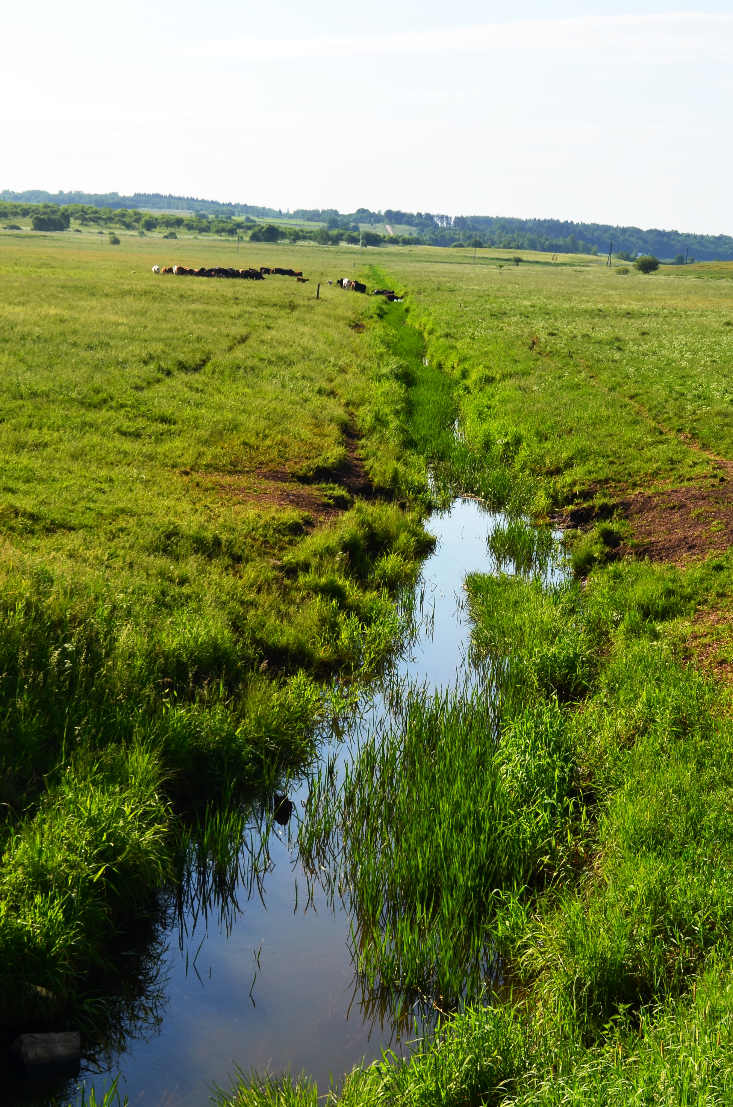 Nemenčia į šiaurę nuo Veriškių, Vilniaus raj.